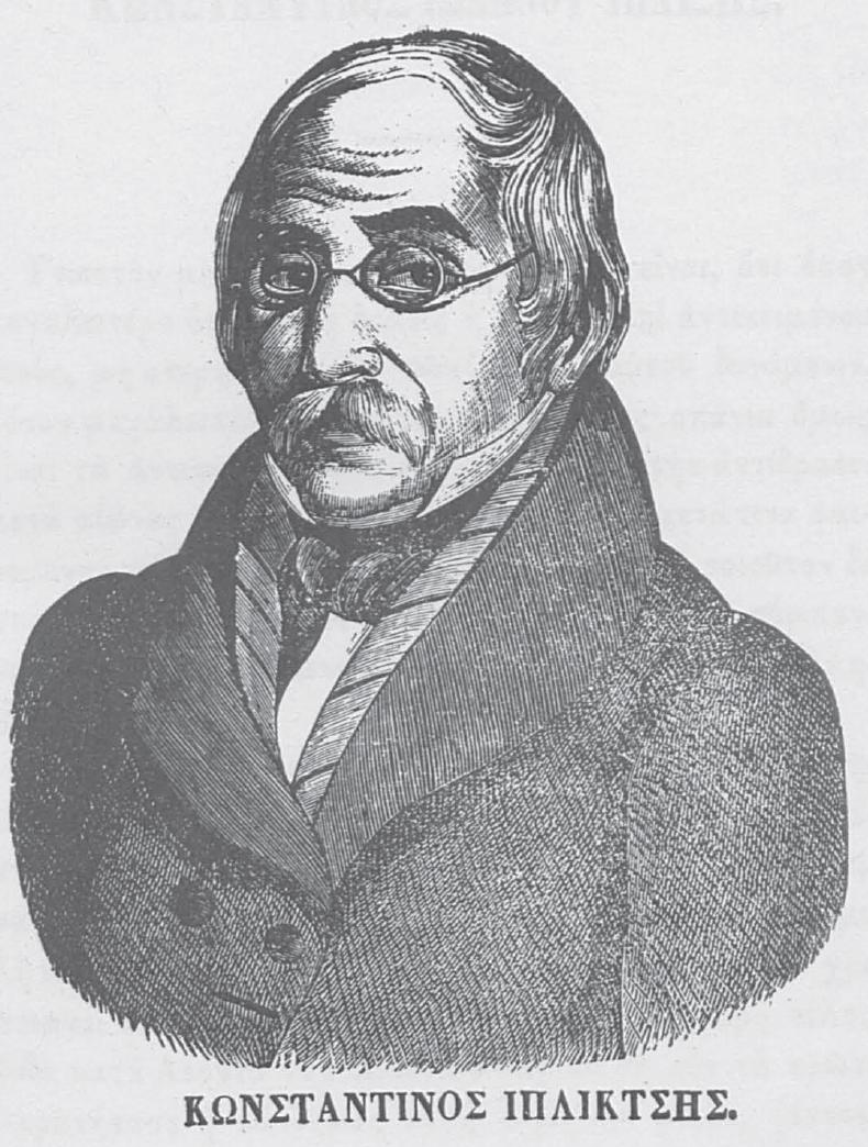 Griechischer Gelehrter, 19. Jahrhundert